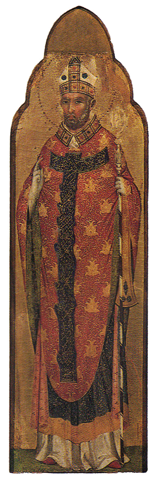 Paolo Veneziano, Polittico dei santi Cosma e Damiano . La figura di Sant'Ambrogio. Opera esposta nella Pinacoteca Tosio Martinengo a Brescia.